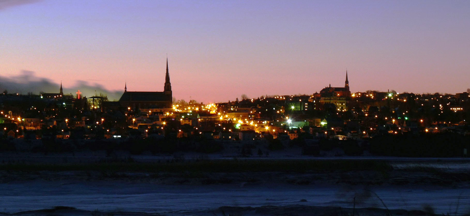 Ville de Rivière-du-Loup au Bas-Saint-Laurent (Québec)vue à partir du confluent de la rivière du Loup et du fleuve Saint-Laurent